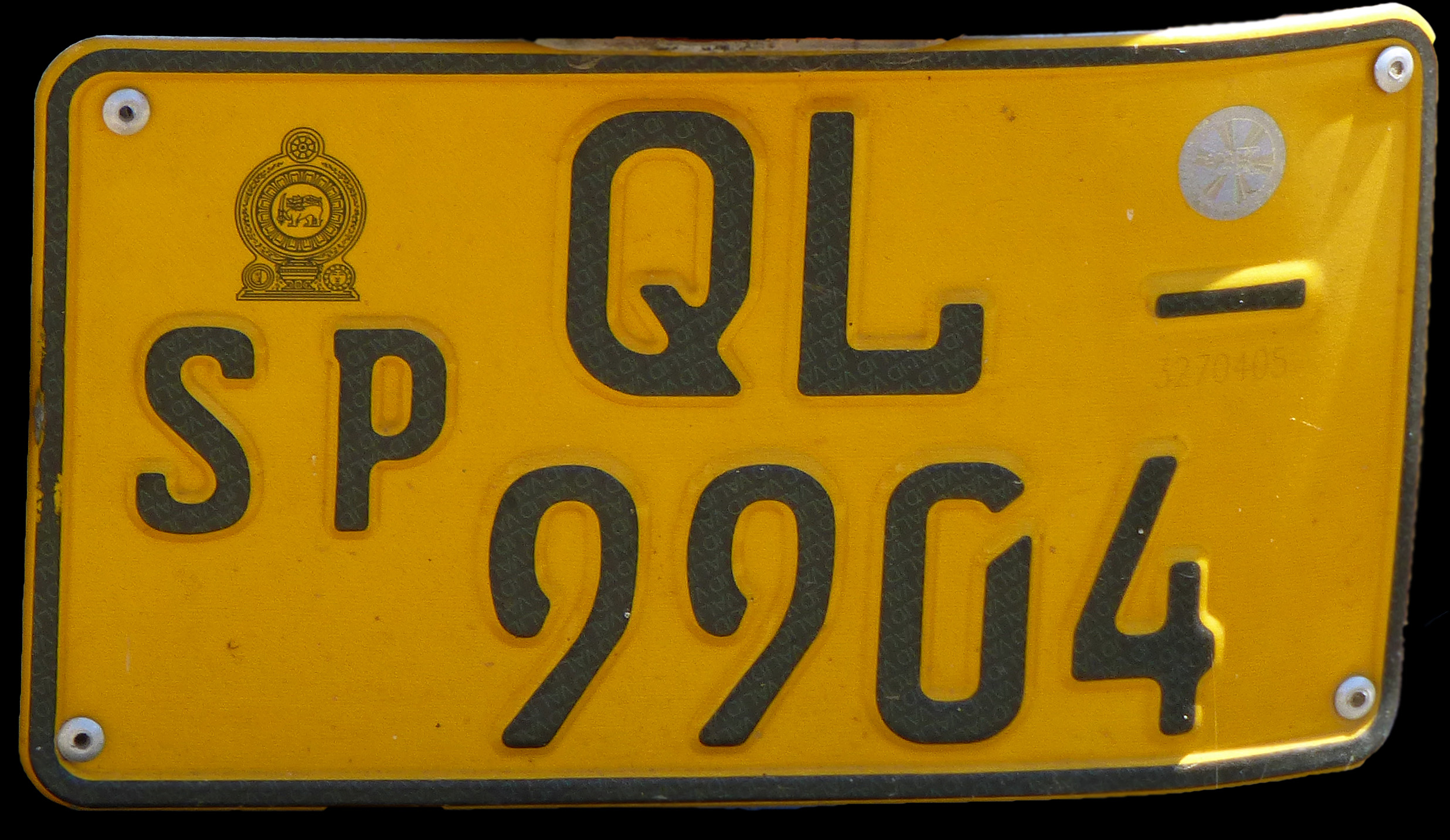 Plaque d'immatriculation du Sri Lanka (Southern Province)